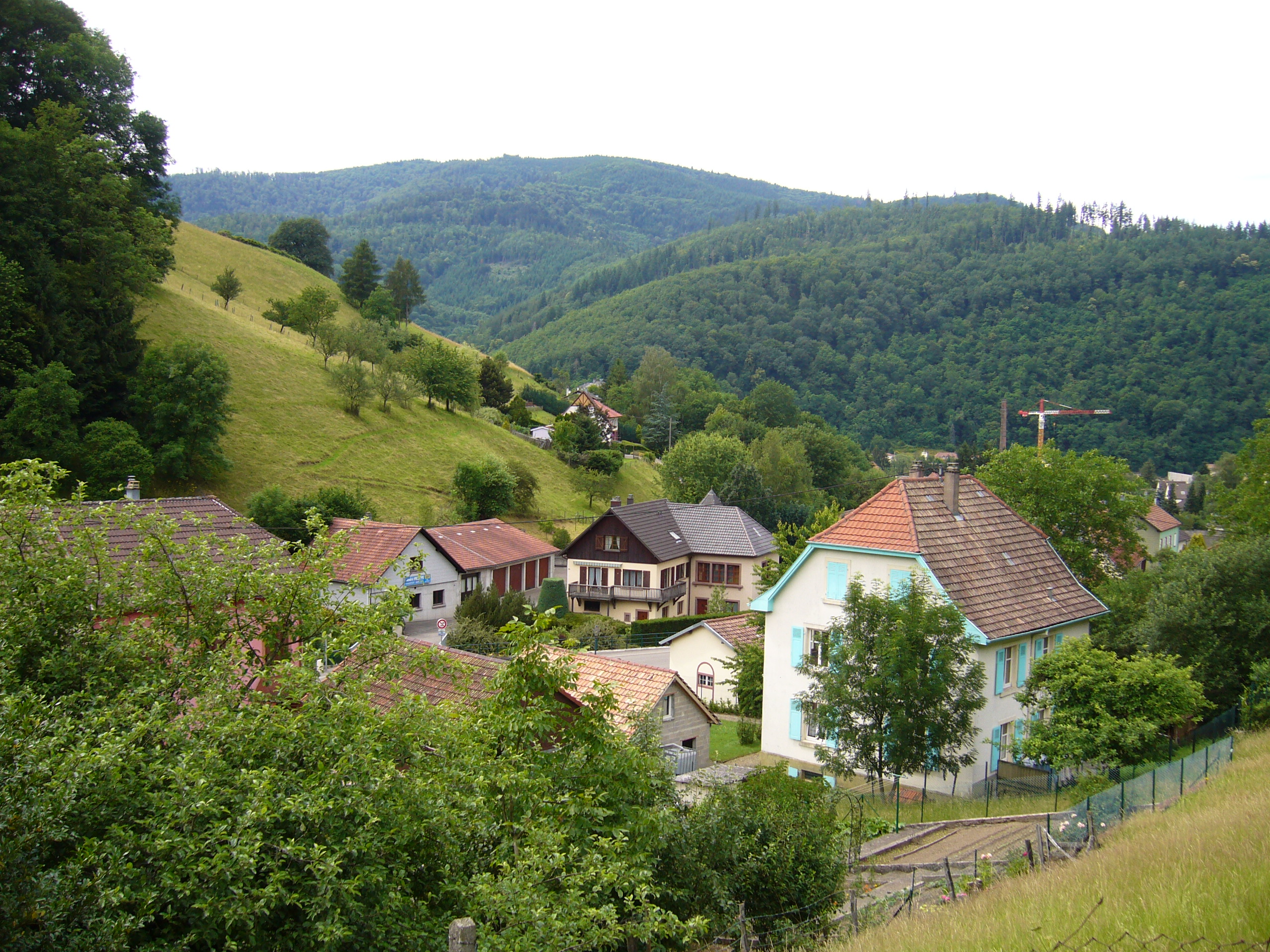 Une partie de Fertrupt